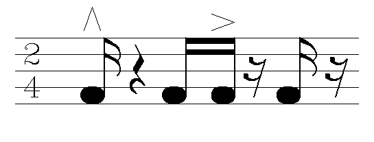 Tabanka rhythm model